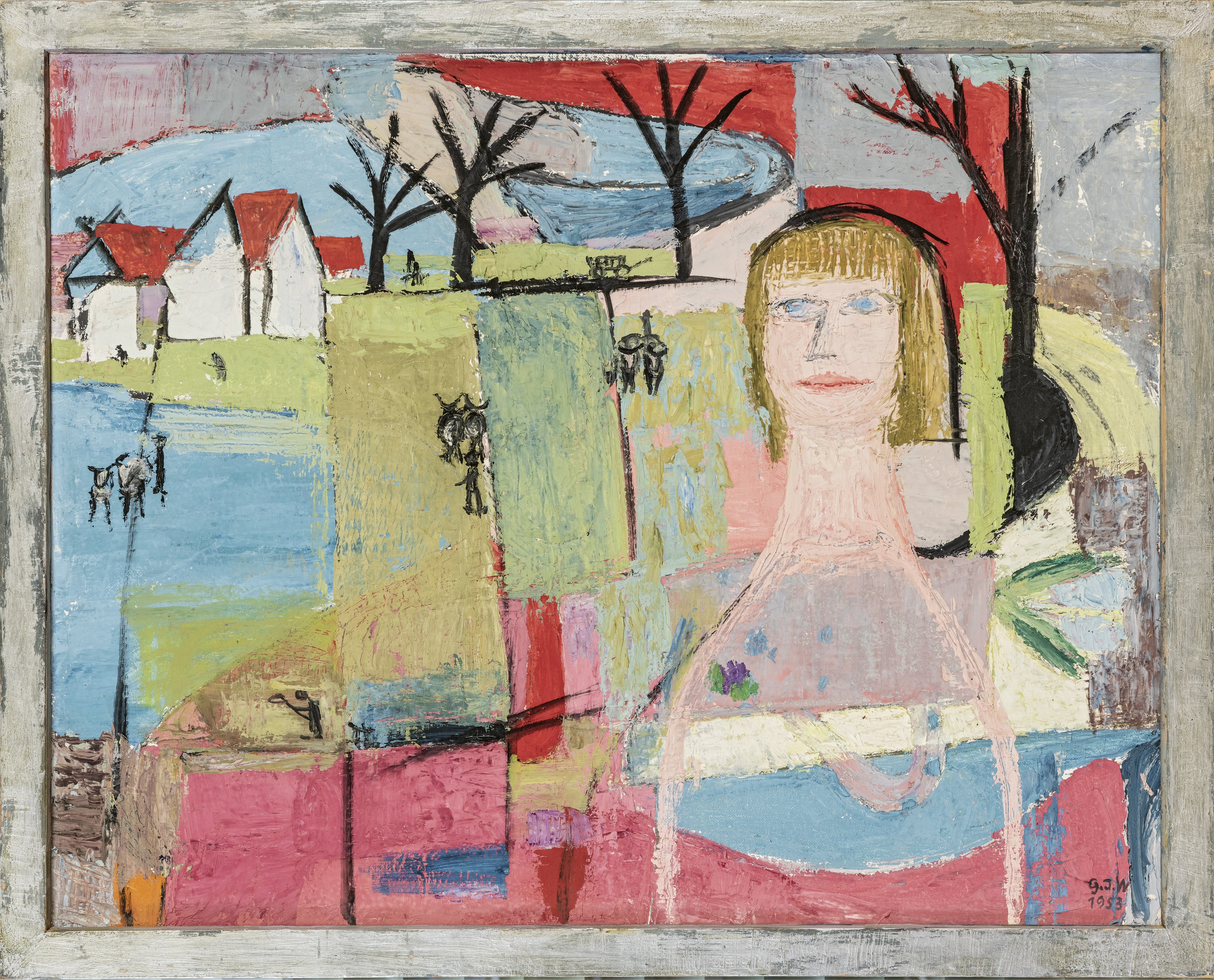 Gudrun Irene Widmann Gemälde-Katalog-007, Titel: Im Märzen der Bauer, 1953, Mischtechnik auf Leinwand, 76 x 95 cm